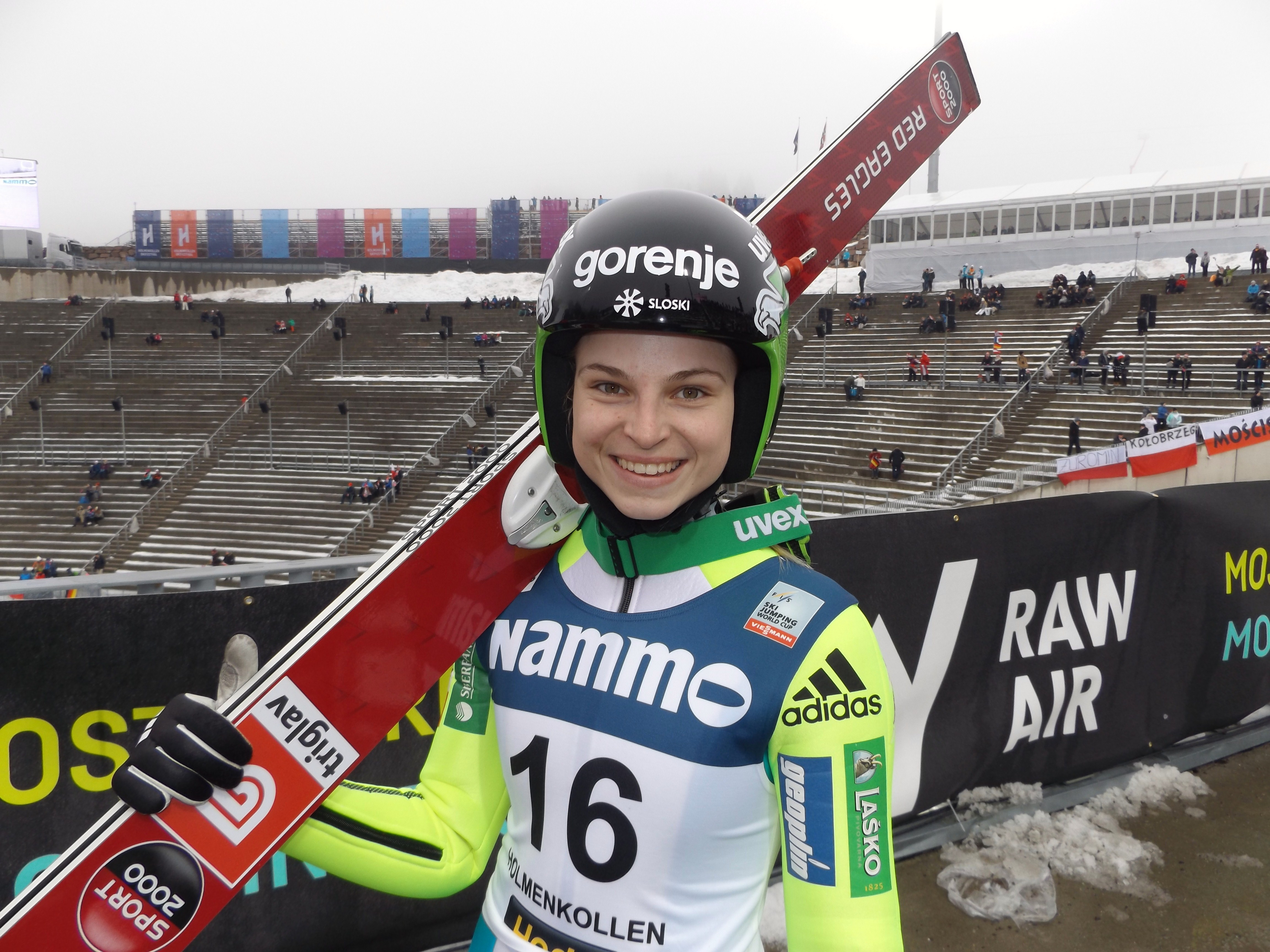 Spela Rogelj am Holmenkollen in Oslo am 12.03.2017